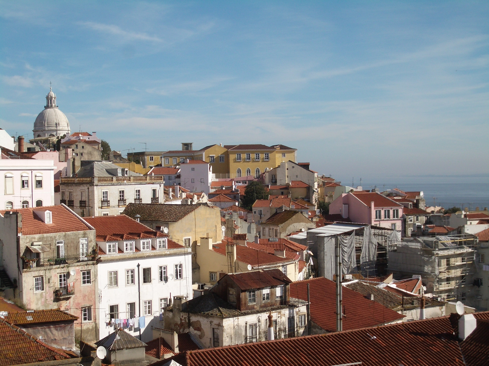 Autore: Esme Vos Fonte: Descrizione: Una veduta del quartiere Alfama di Lisbona Licenza : Creative Commons 2.0